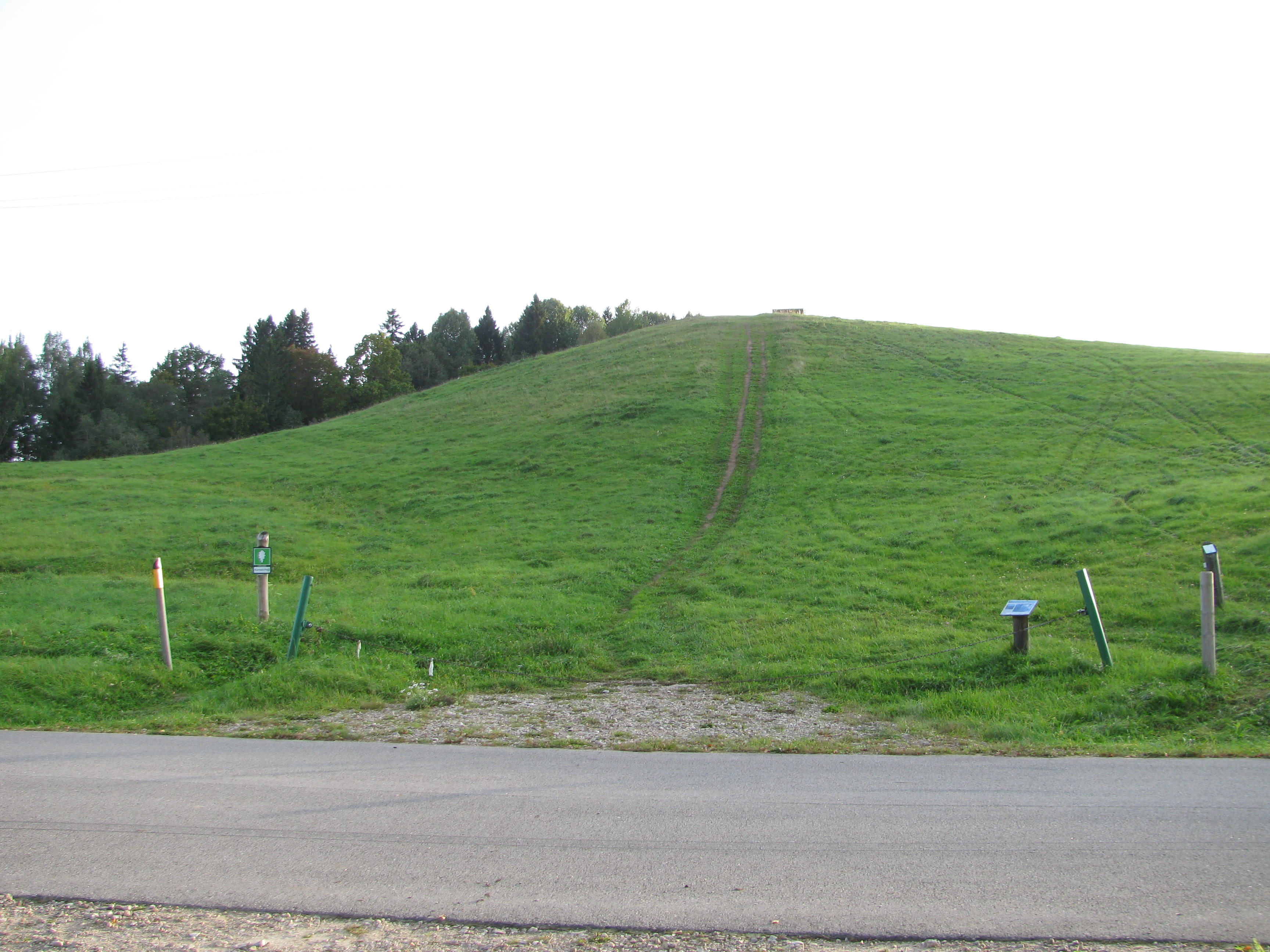 Drusku (Kornetu) kalns, Veclaicenes pagasts